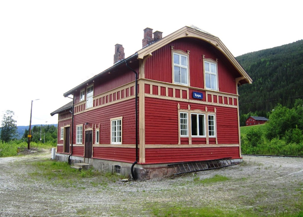 Torpo stasjon (Bergensbanen)